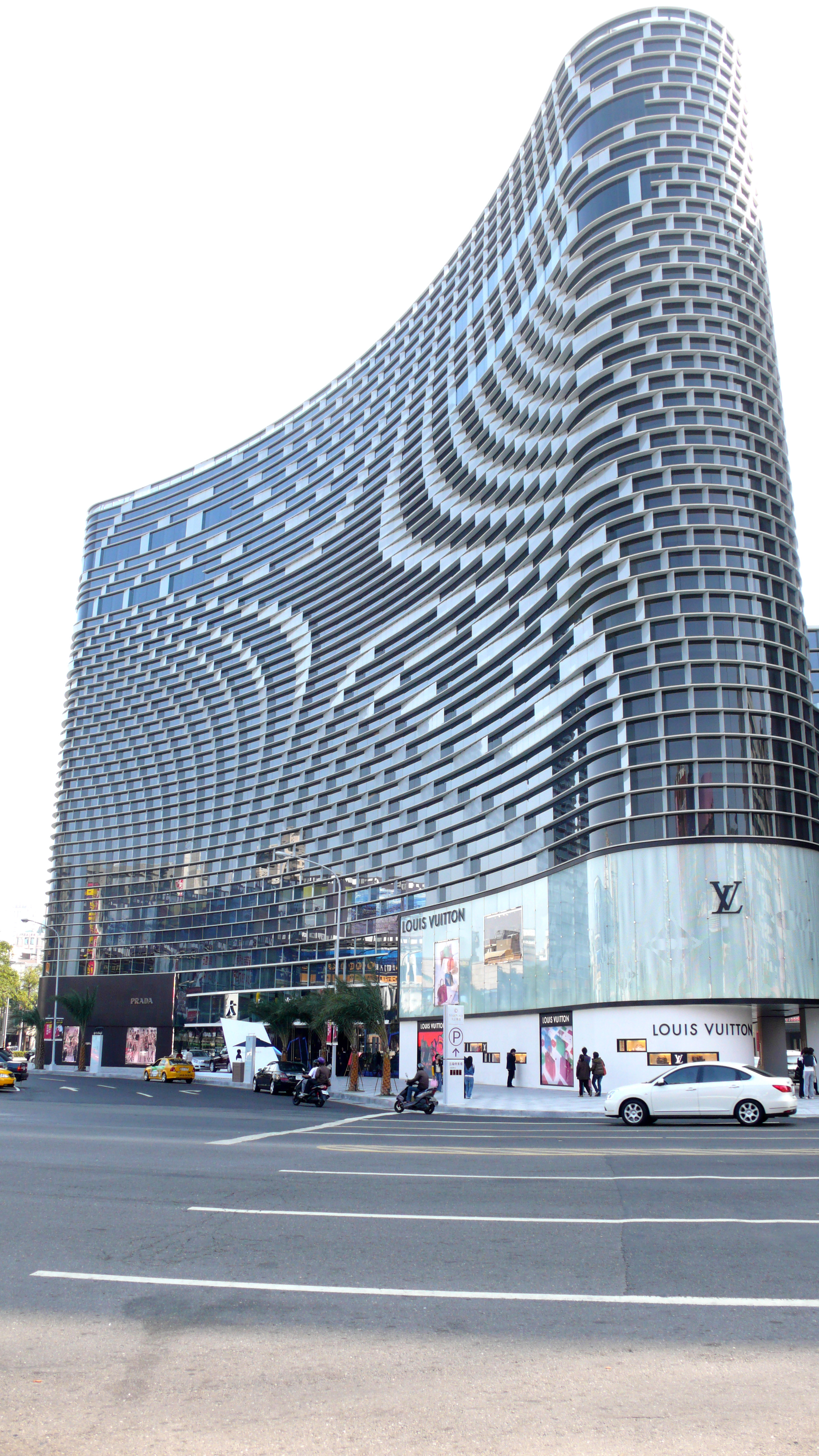 20090125_高雄大立百貨北海道展 01 大統精品